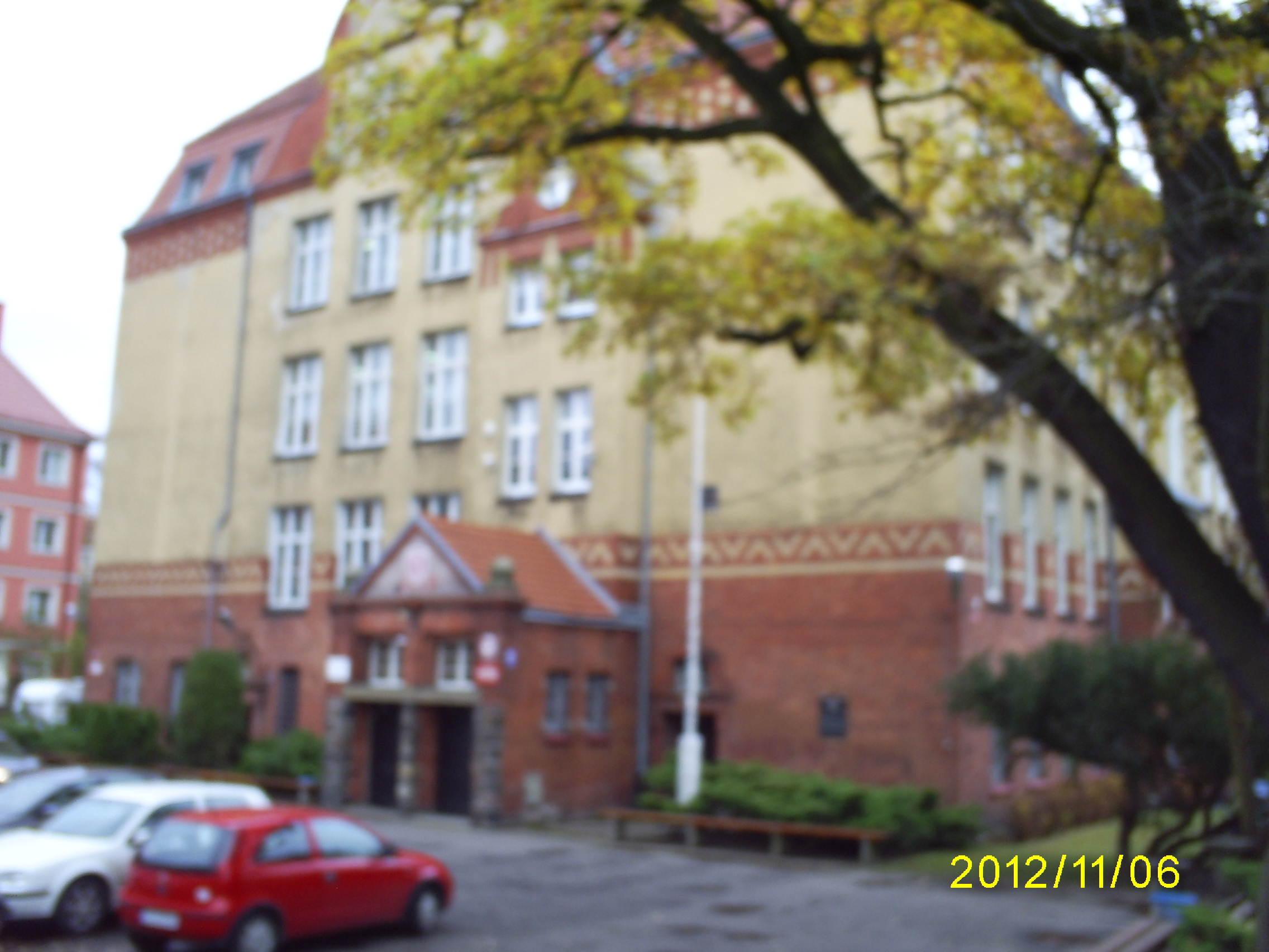 Liceum Ogólnokształcące nr 6 im. Stefana Czarnieckiego w Szczecinie, ul. Jagiellońska 41